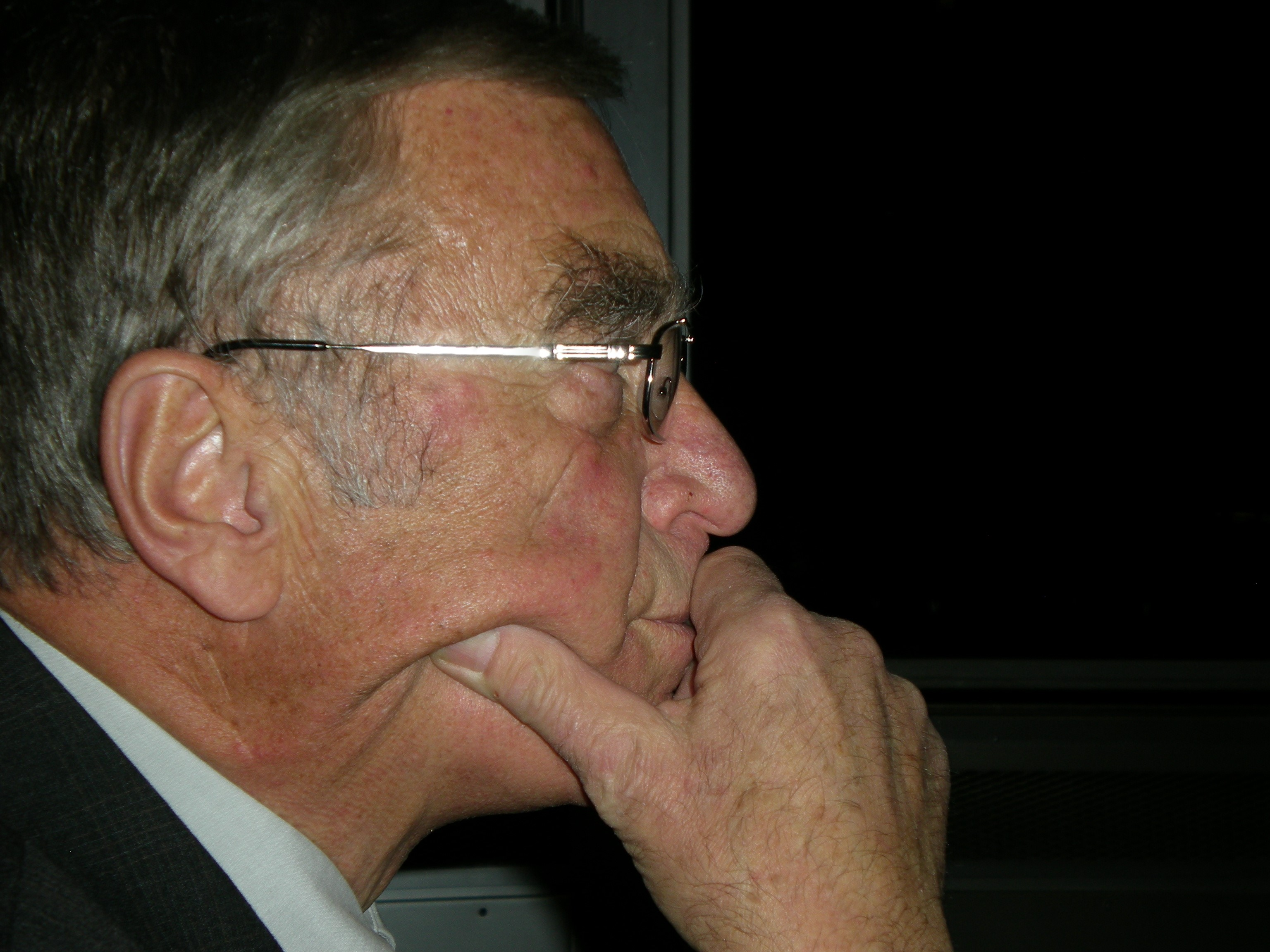 Mesch, Franz - der Denker